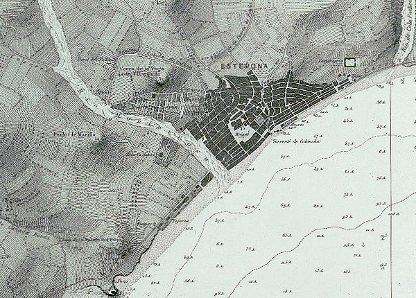 Inserta vista de la zona desde el mar a 3 millas y 60 cm de altura. Orientado con rosa e indicando la desviación magnética. - Sondas. - Relieve por sombreado